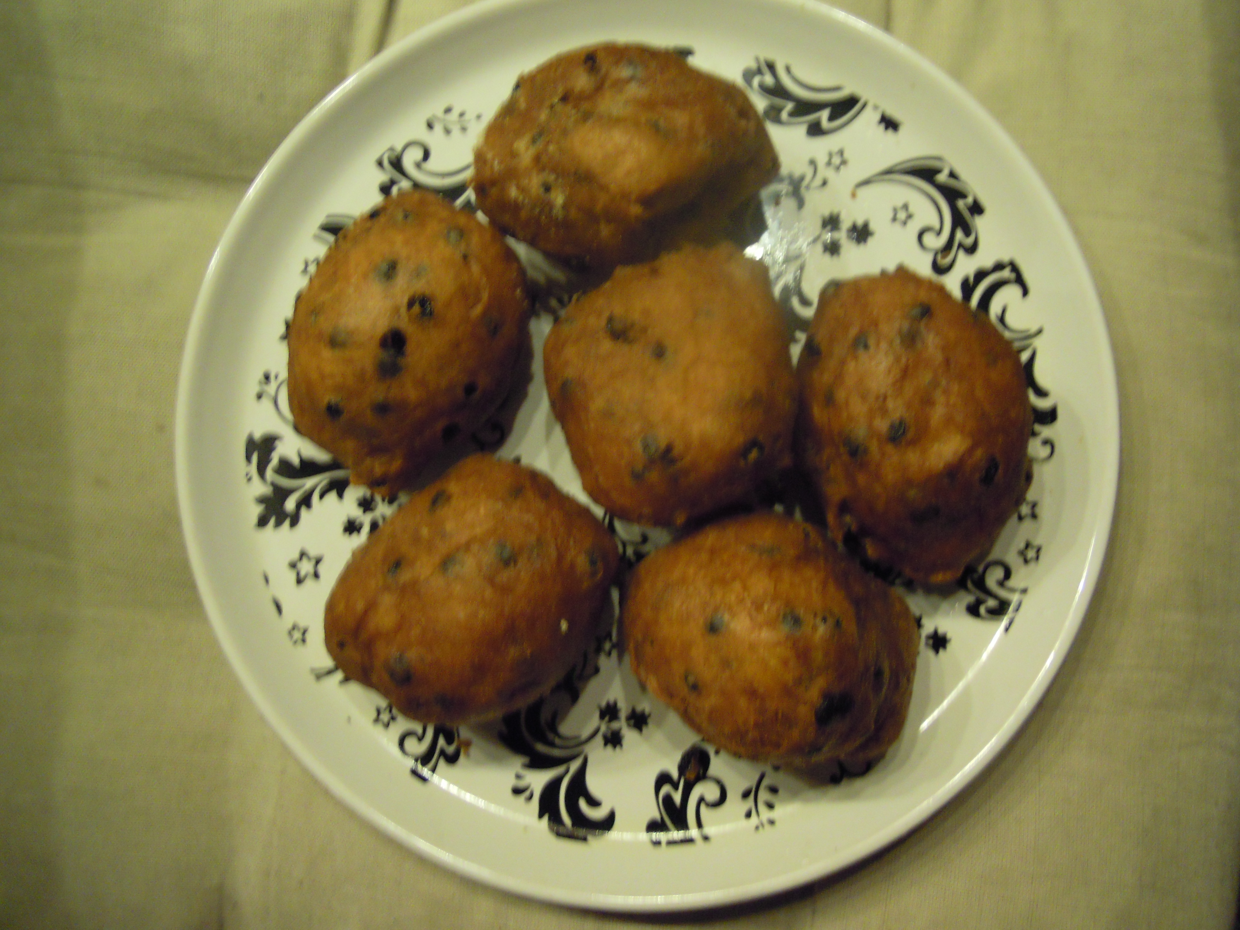 Oliebollen van Richard Visser, de lekkerste van Nederland volgens het AD